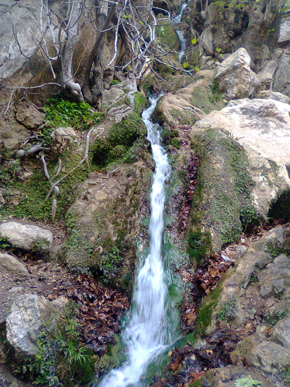 آسیابهای مرغک